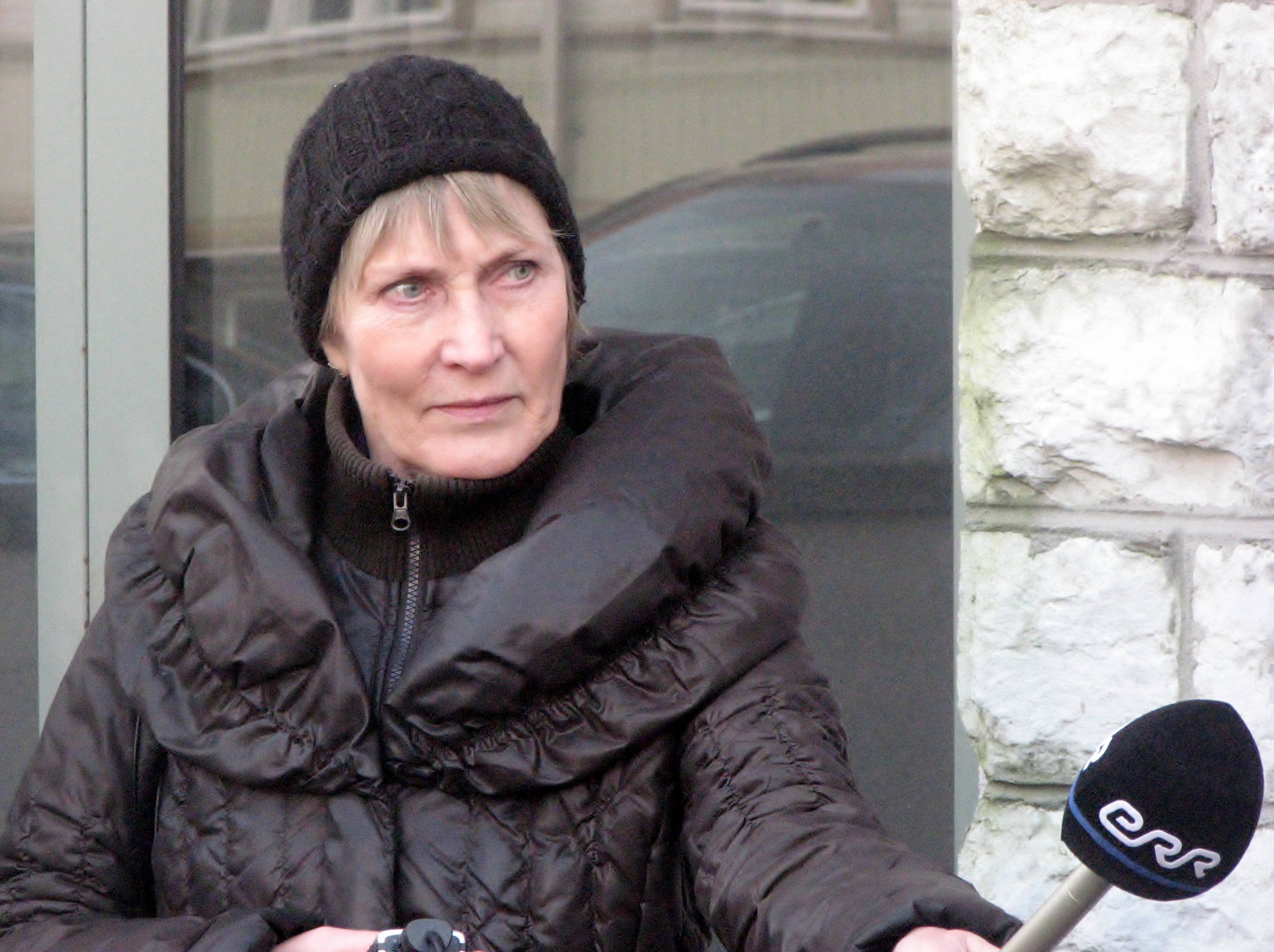 Riina Eentalu 12. aprillil 2013 Särevi Teatritoa välisukse juures uue infotahvli avamisel